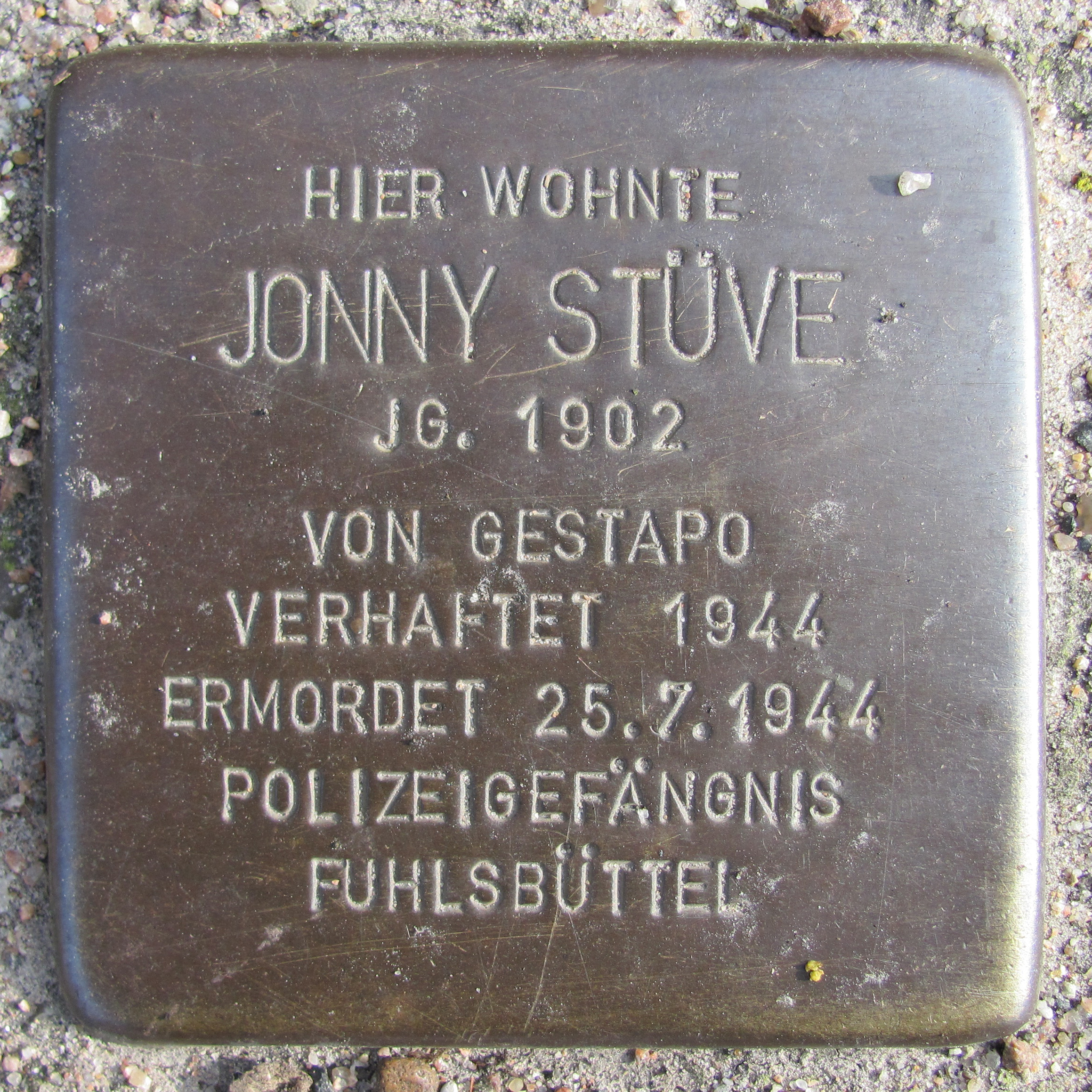 Stolperstein für Jonny Stüve vor dem Haus Alter Teichweg 180